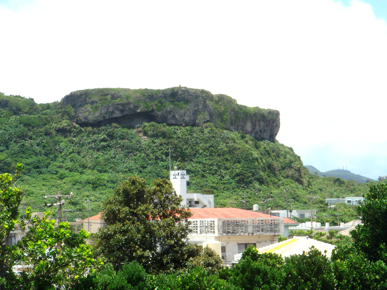 ティンダハンタ（沖縄県与那国島）